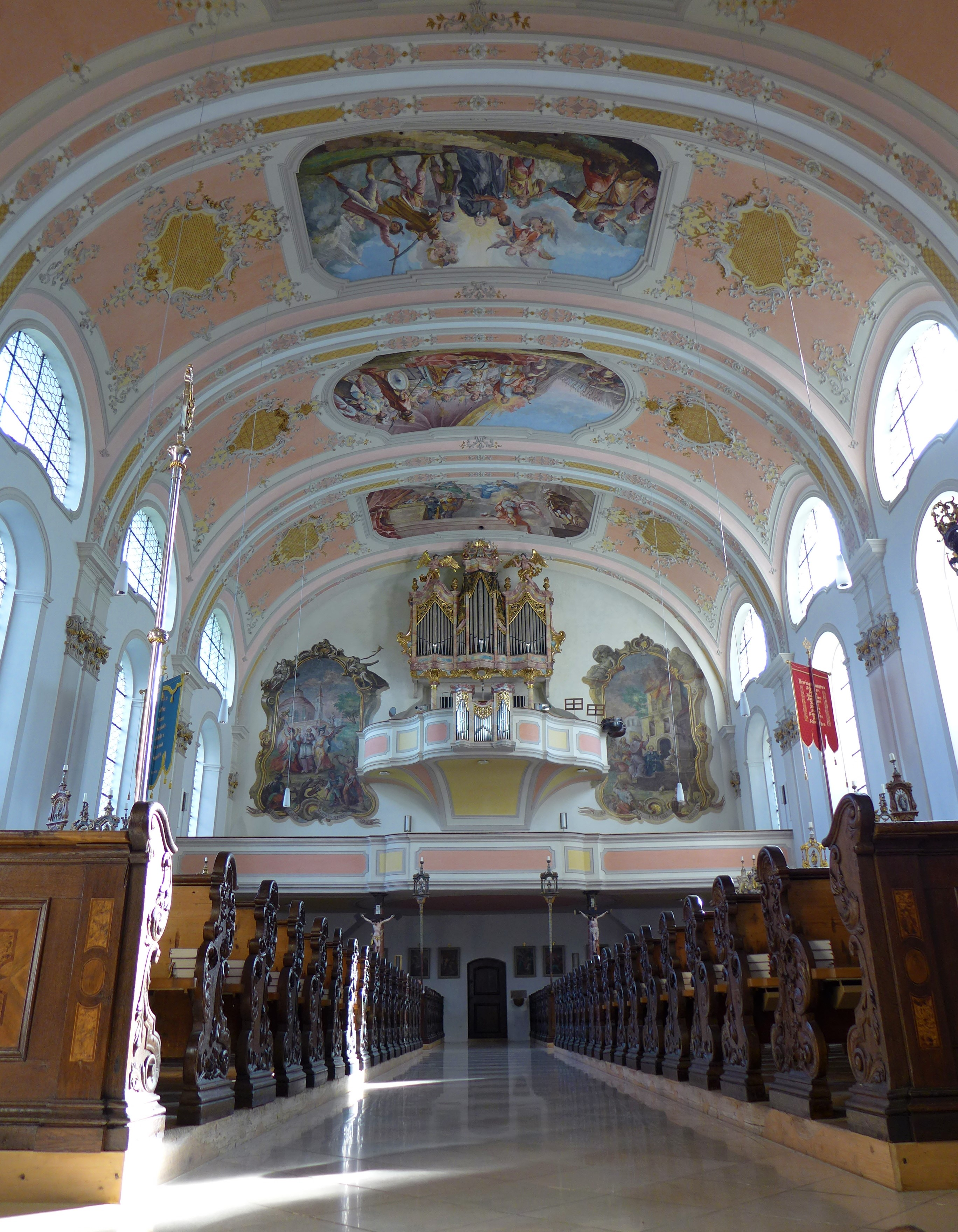 St. Martin (Garmisch-Partenkirchen), Blick zur Orgelempore